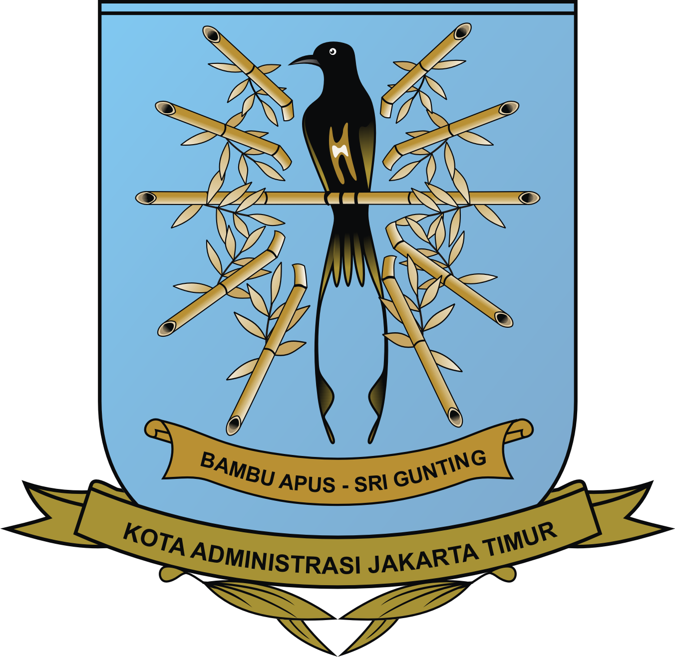 Seal of East Jakarta